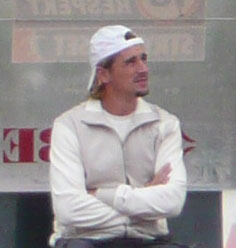 Cesar Santin